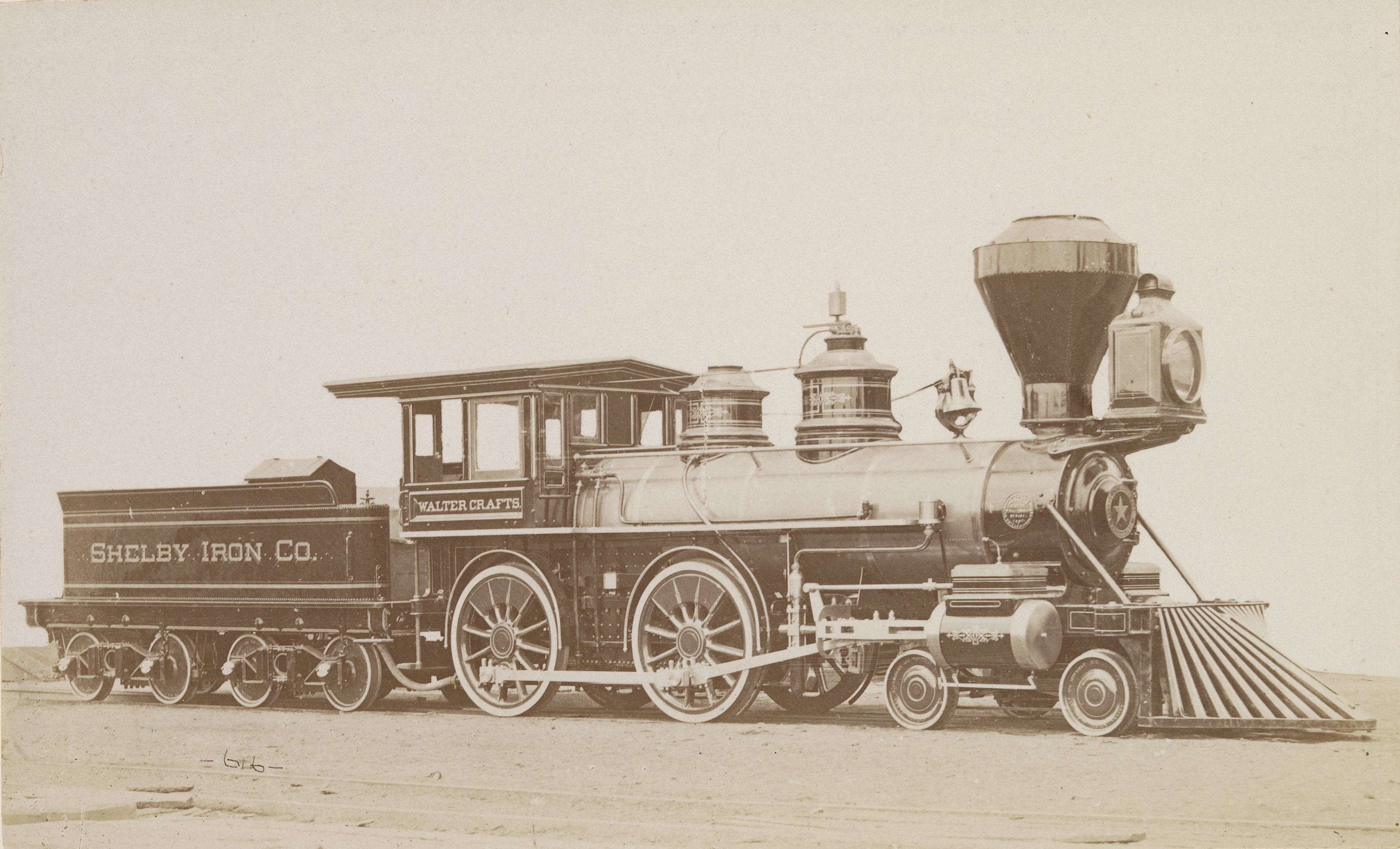 IdentificatieTitel(s): Amerikaanse stoomlocomotief voor passagiersvervoerObjecttype: foto bladzijde Objectnummer: RP-F-2001-7-998-1VervaardigingVervaardiger: fotograaf: anoniemPlaats vervaardiging: Verenigde Staten van AmerikaDatering: ca. 1871 - in of voor 1881Materiaal: fotopapier Techniek: albuminedrukAfmetingen: foto: h 122 mm × b 200 mmToelichtingFoto op pagina 62.OnderwerpWat: steam locomotiveVerwerving en rechtenCredit line: Aankoop met steun van de Mondriaan Stichting, het Prins Bernhard Cultuurfonds, het VSBfonds, het Paul Huf Fonds/Rijksmuseum Fonds en het Egbert KunstfondsVerwerving: aankoop 2001Copyright: Publiek domein